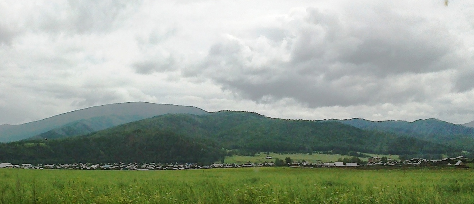 Вид с дороги села Михайловки